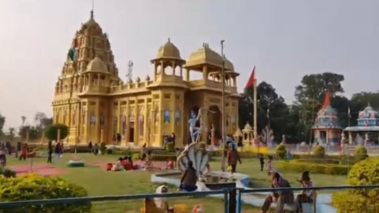 मंदिर की दृश्य